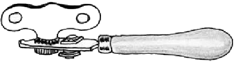 Wheel can opener